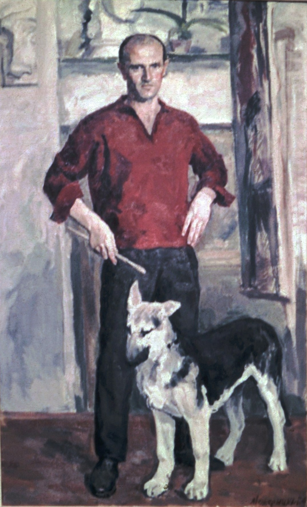 Self-portrait